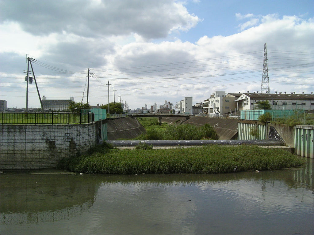 恩智川と第二寝屋川の分岐部（大阪府八尾市/東大阪市）